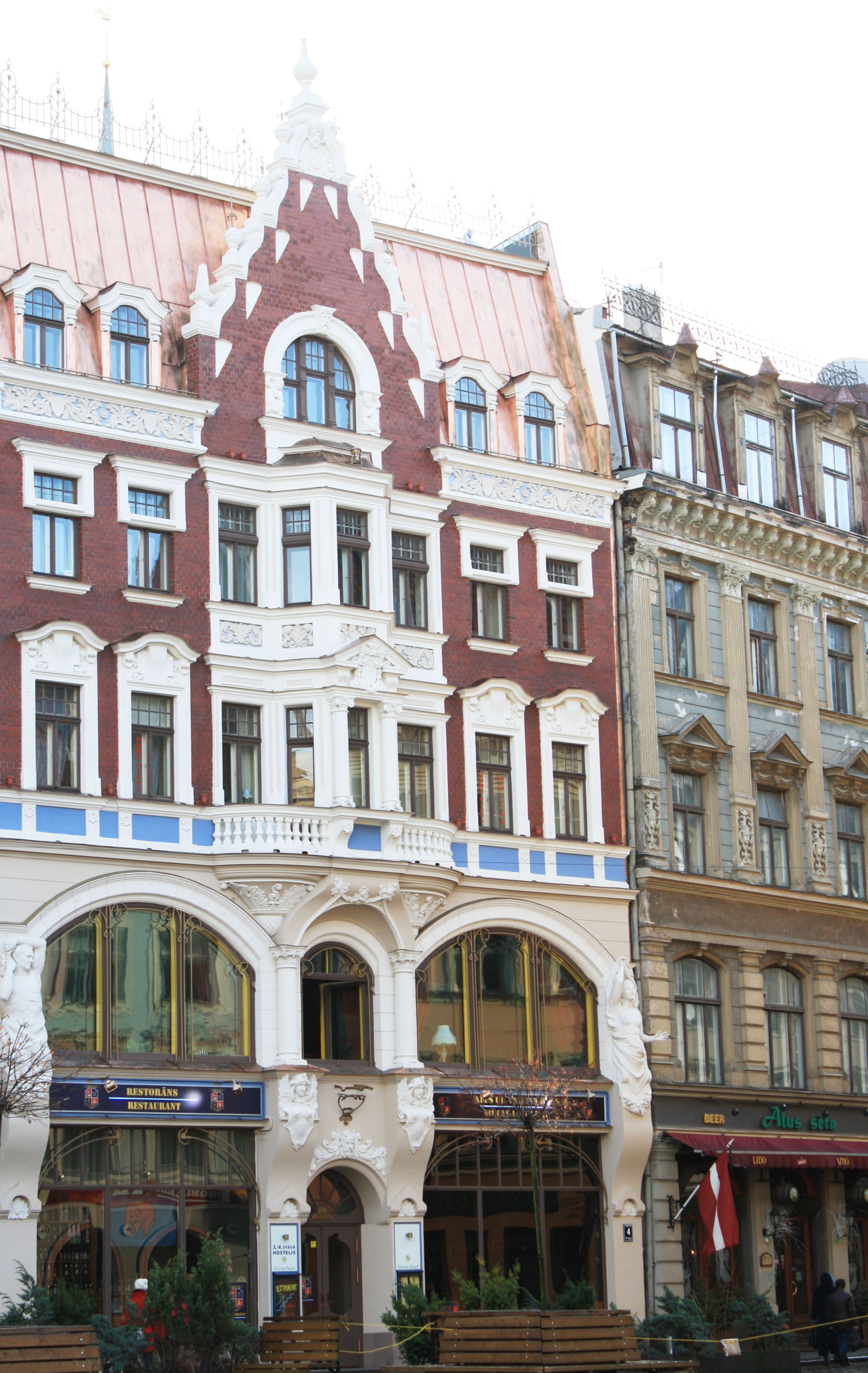 Рига (Латвия) Старый город Дом на Купеческой улице (возле ресторана "Лидо")